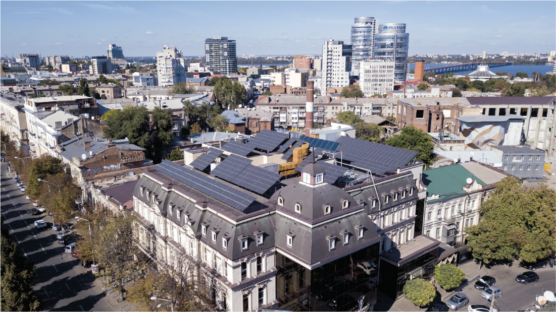 Gril Solar Roof 75 кВт: дахова сонячна електростанція в місті Дніпро